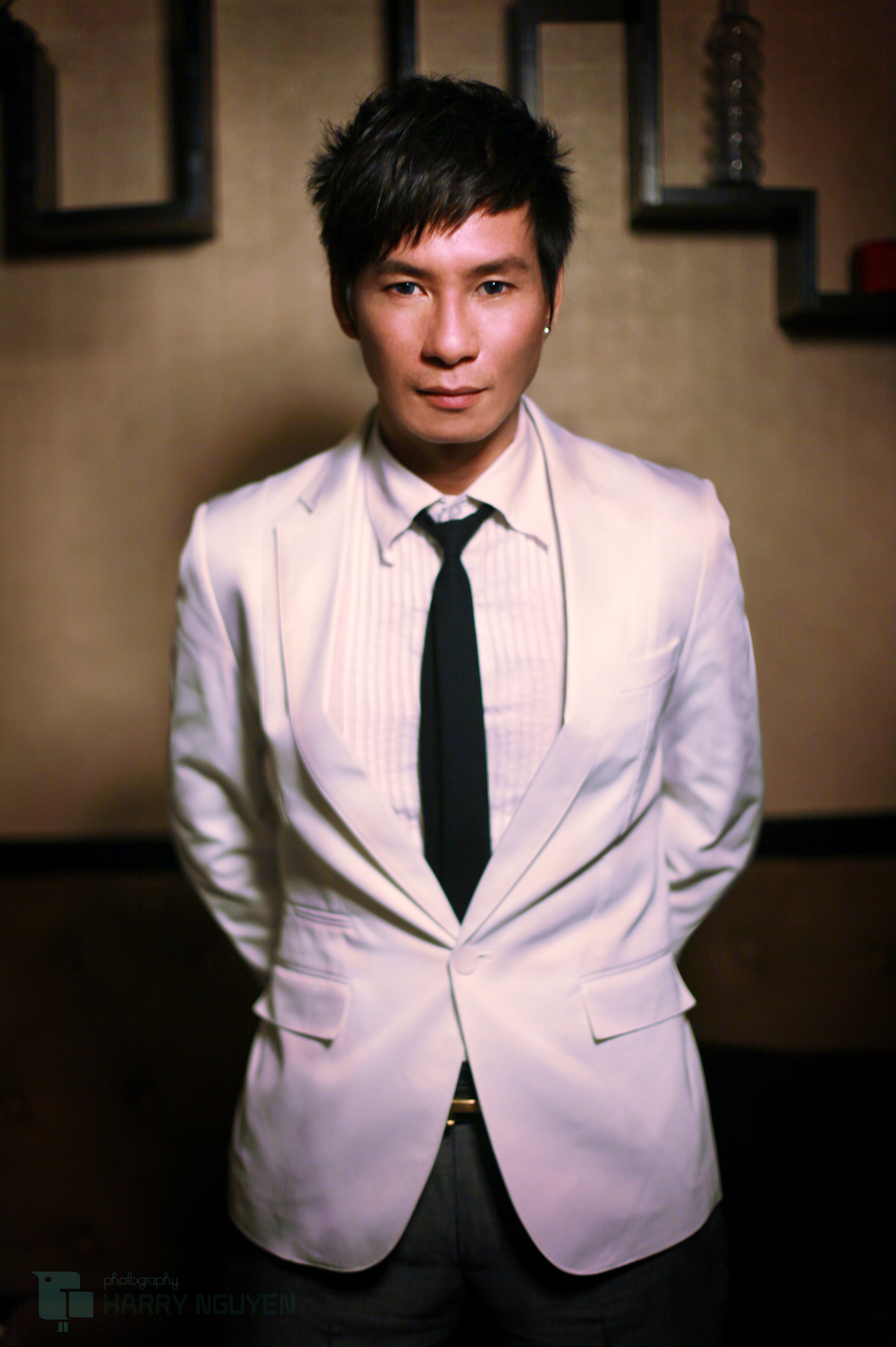 Ca sĩ Lý Hải